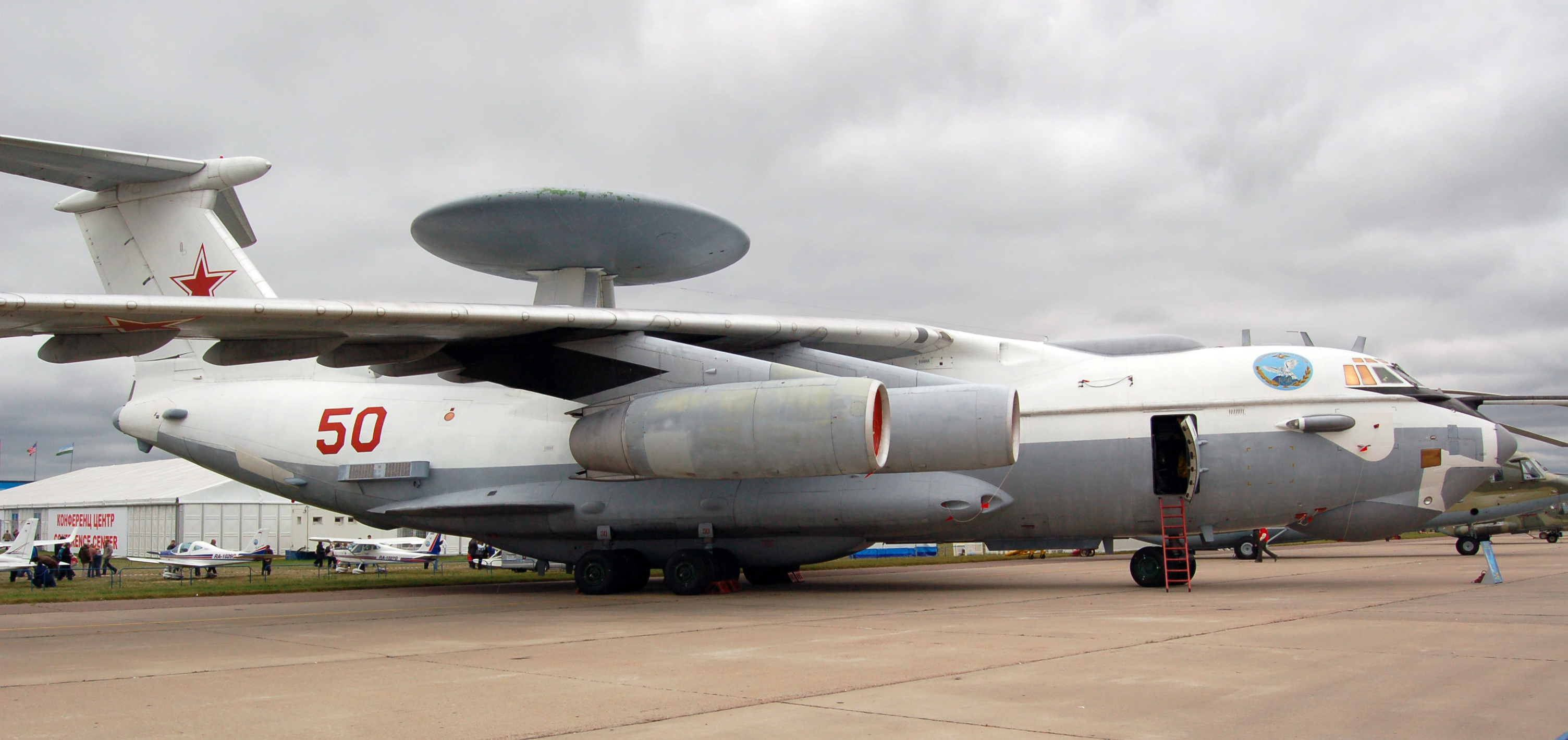 Самолёт ДРЛОиУ А-50 на статической стоянке МАКС-2009